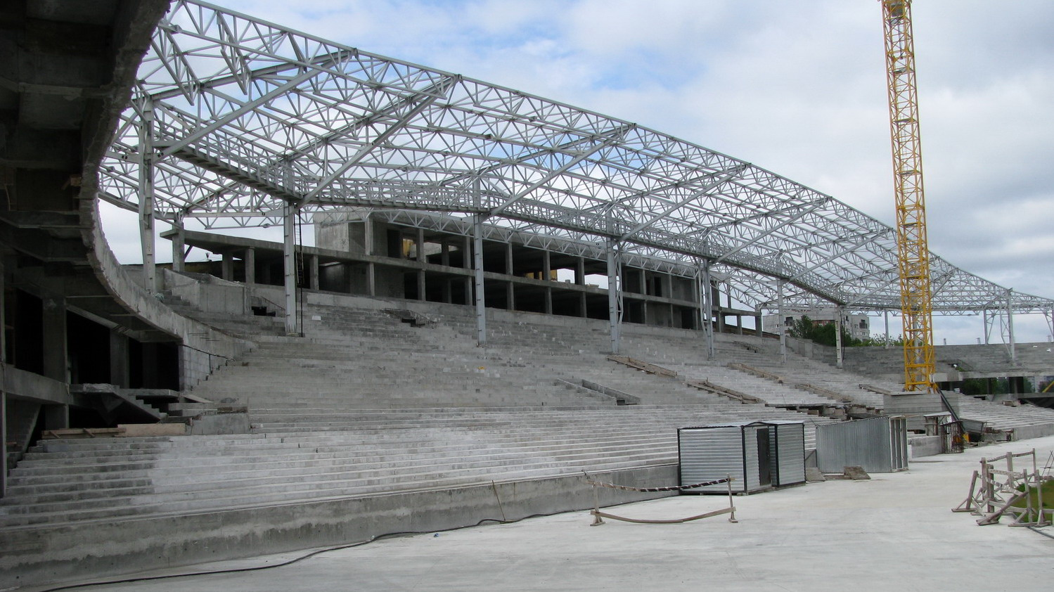 Реконструкция Центрального стадиона в Екатеринбурге